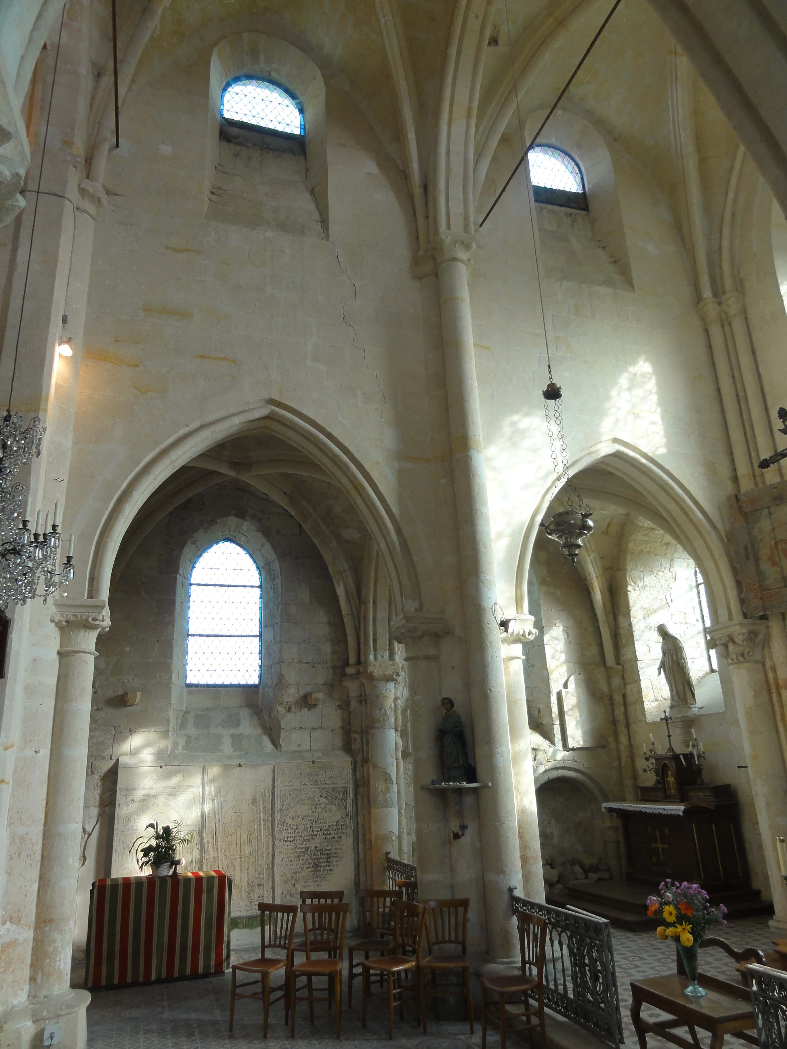 Intérieur de l'église - voir titre.